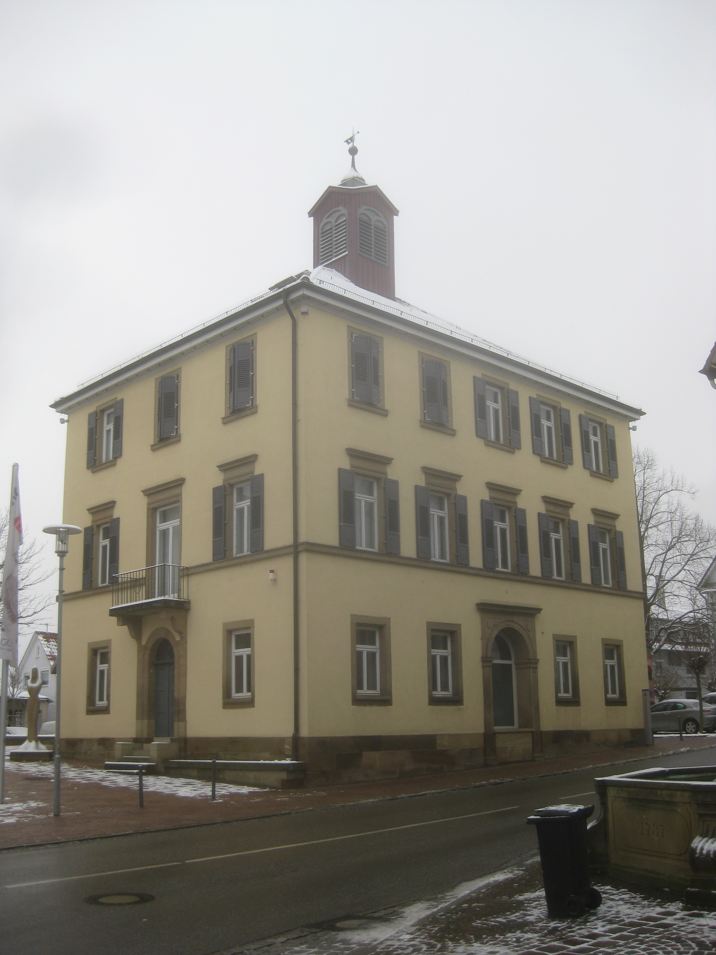 Römermuseum, Güglingen, Marktstraße 18.